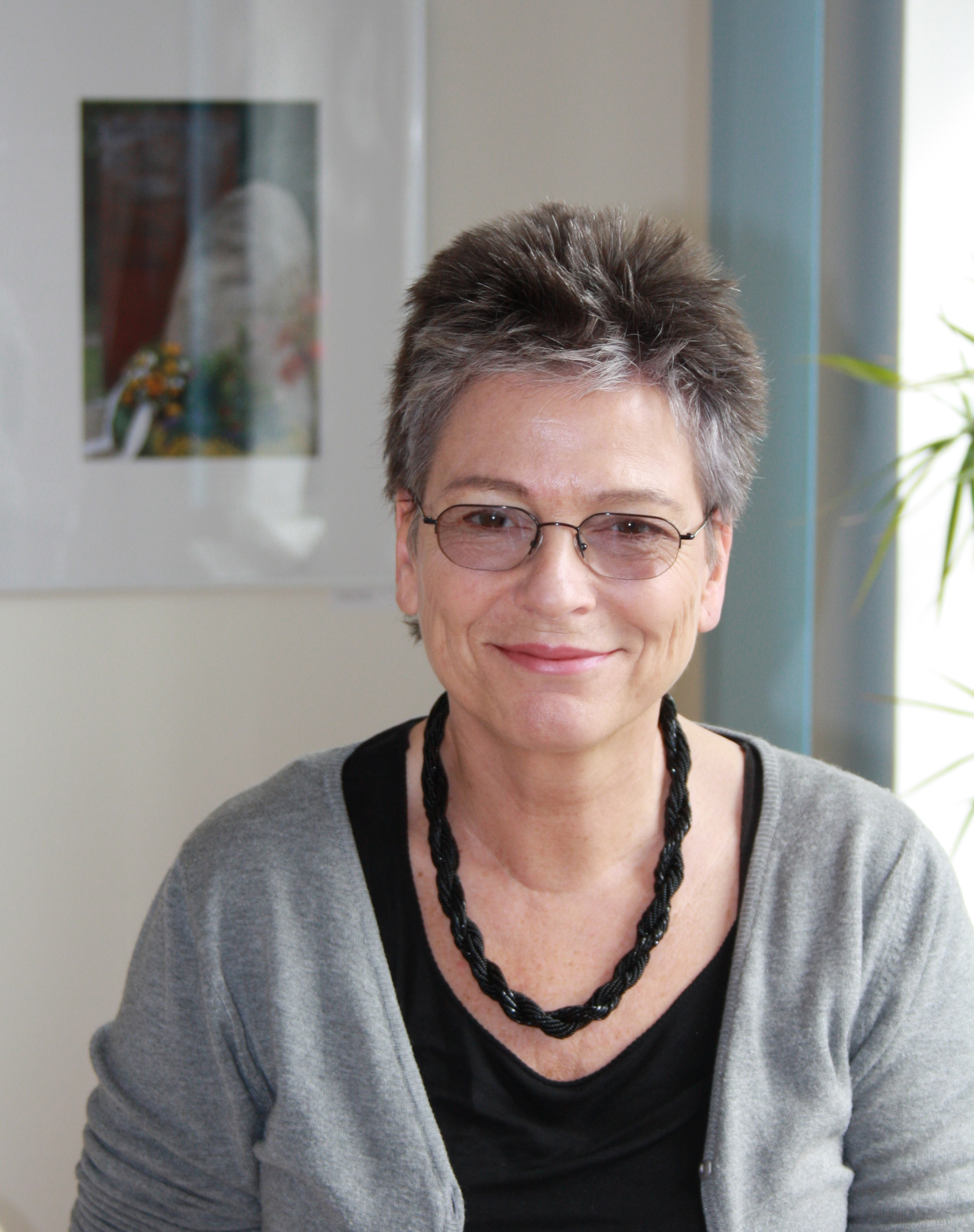 Die erste Beauftragte des Landes Brandenburg zur Aufarbeitung der Folgen der kommunistischen Diktatur, Ulrike Poppe